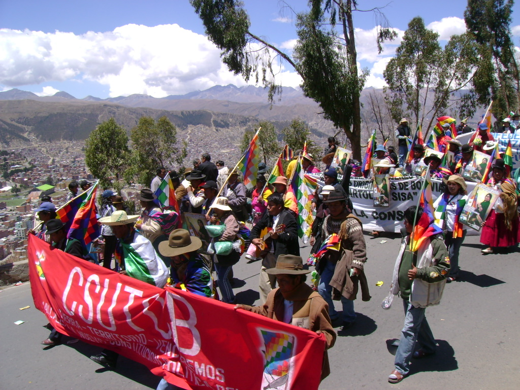 Marcha en apoyo de la nueva constitución de Bolivia. 20 de octubre de 2008.